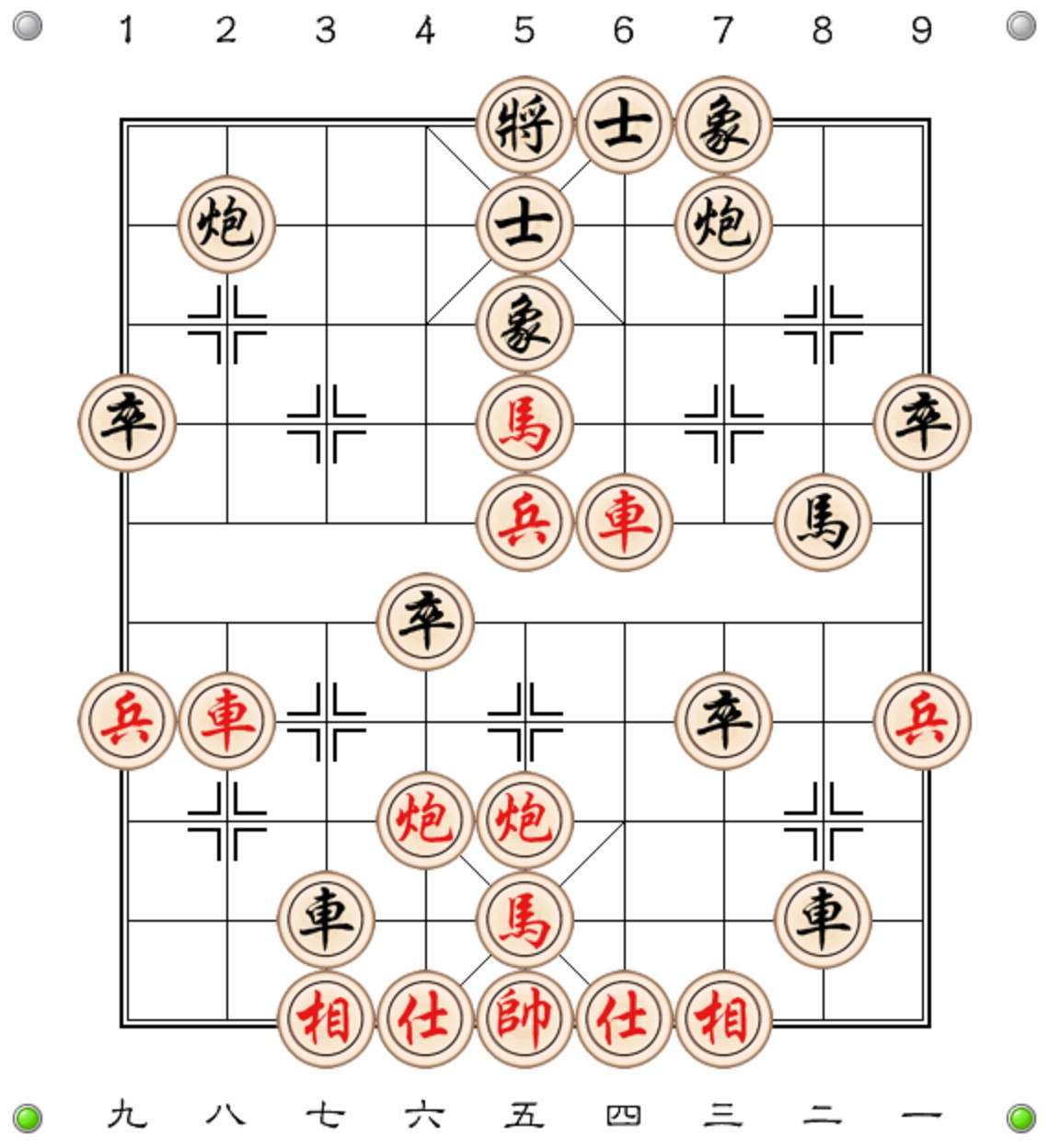 Cấp tiến trung binh - Từ siêu 2017